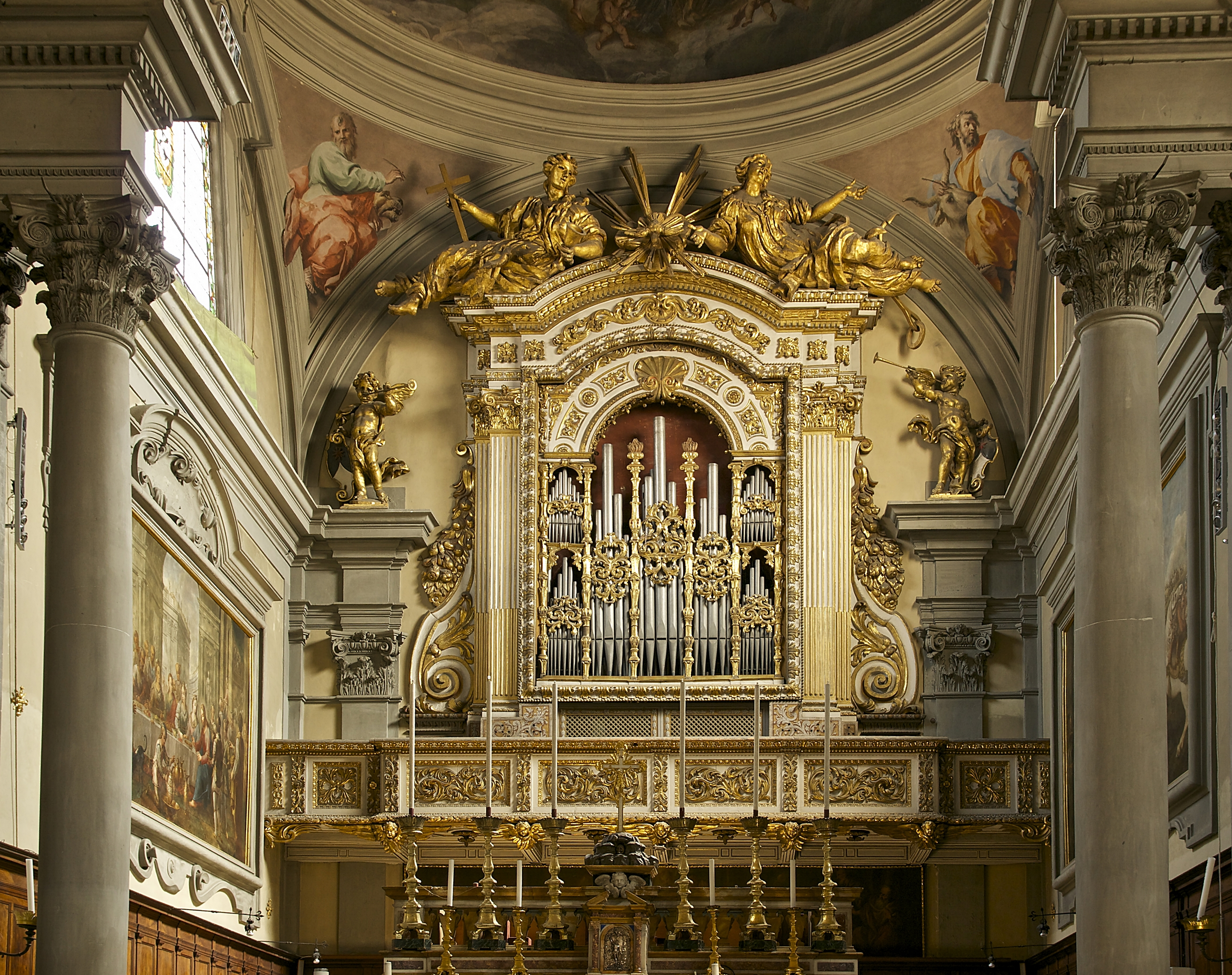 L'orgue, au dessus de l'autel de l'église San Marco à Florence